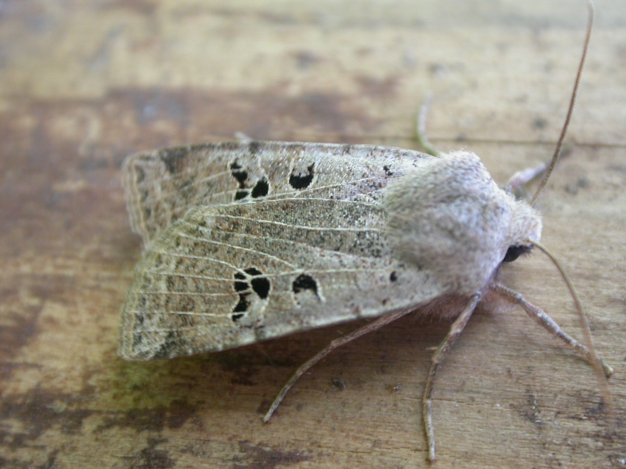 Conistra rubiginosa, to MV light, Hellerup, Denmark, 19 April 2004